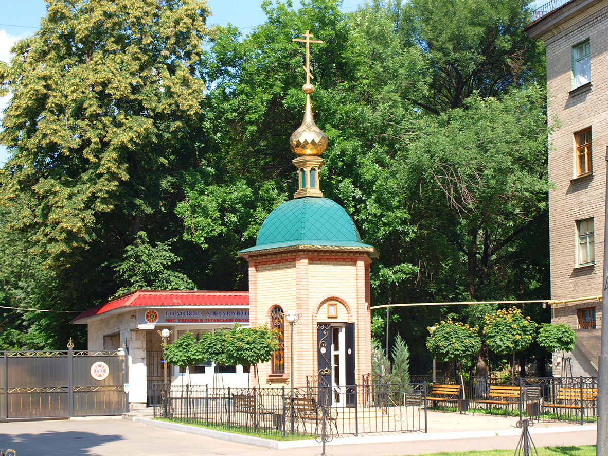 Каплиця на території пожежної частини на вул. Челюскінців (Луганськ)